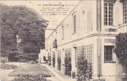 Domaine de Leuville-sur-Orge, dans l'Essonne, en France. Photographie de profil prise en 1910 Public domain PD-1923